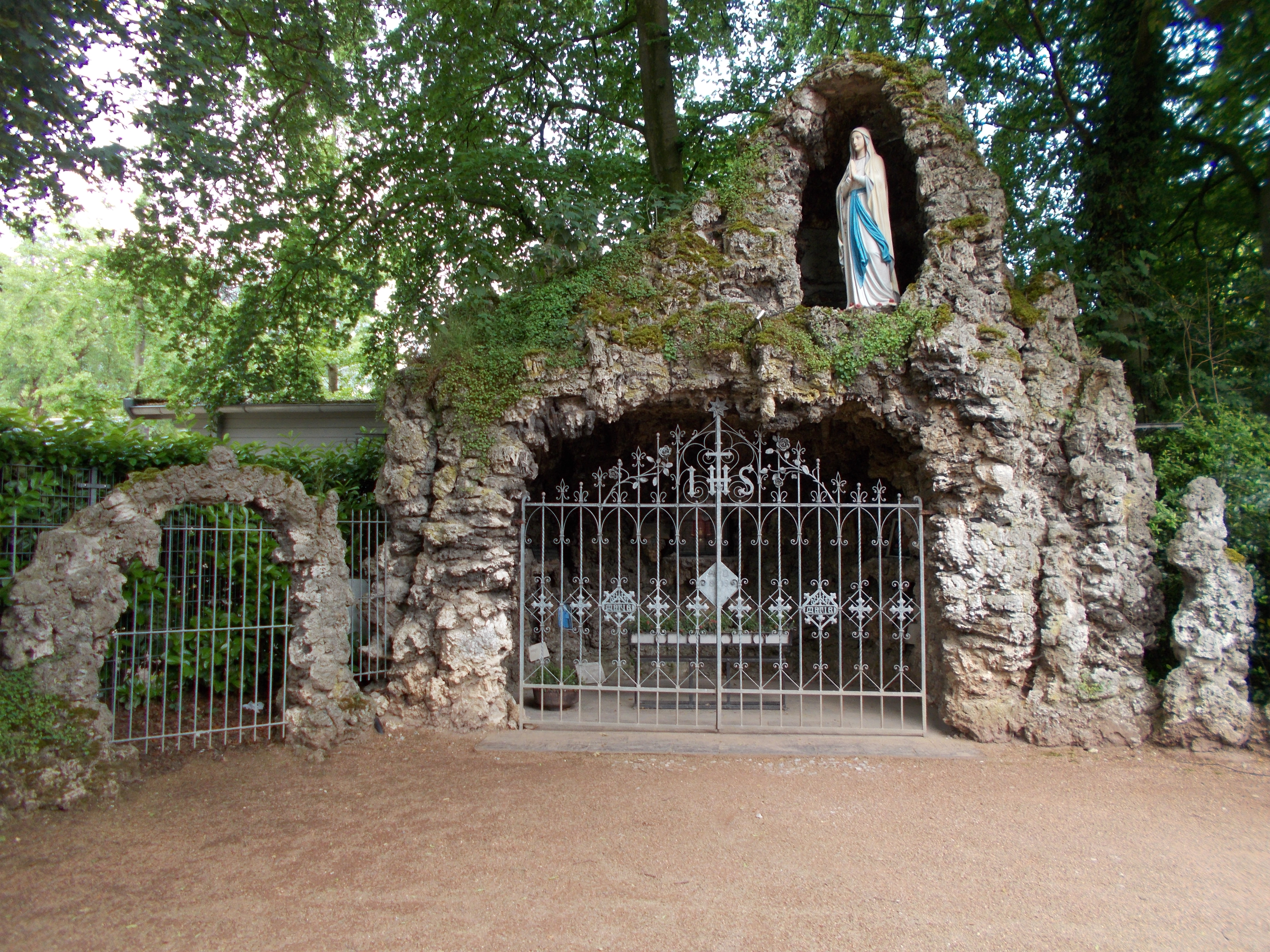 Lourdesgrotte am Wallfahrtsort Hehn in Mönchengladbach. (Mariengrotte)